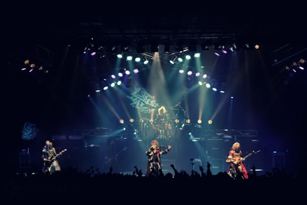 Versailles ~Philharmonic Quintet~. METHOD OF INHERITANCE TOUR, Santiago, Chile, Teatro Teletón, (June 6, 2010)